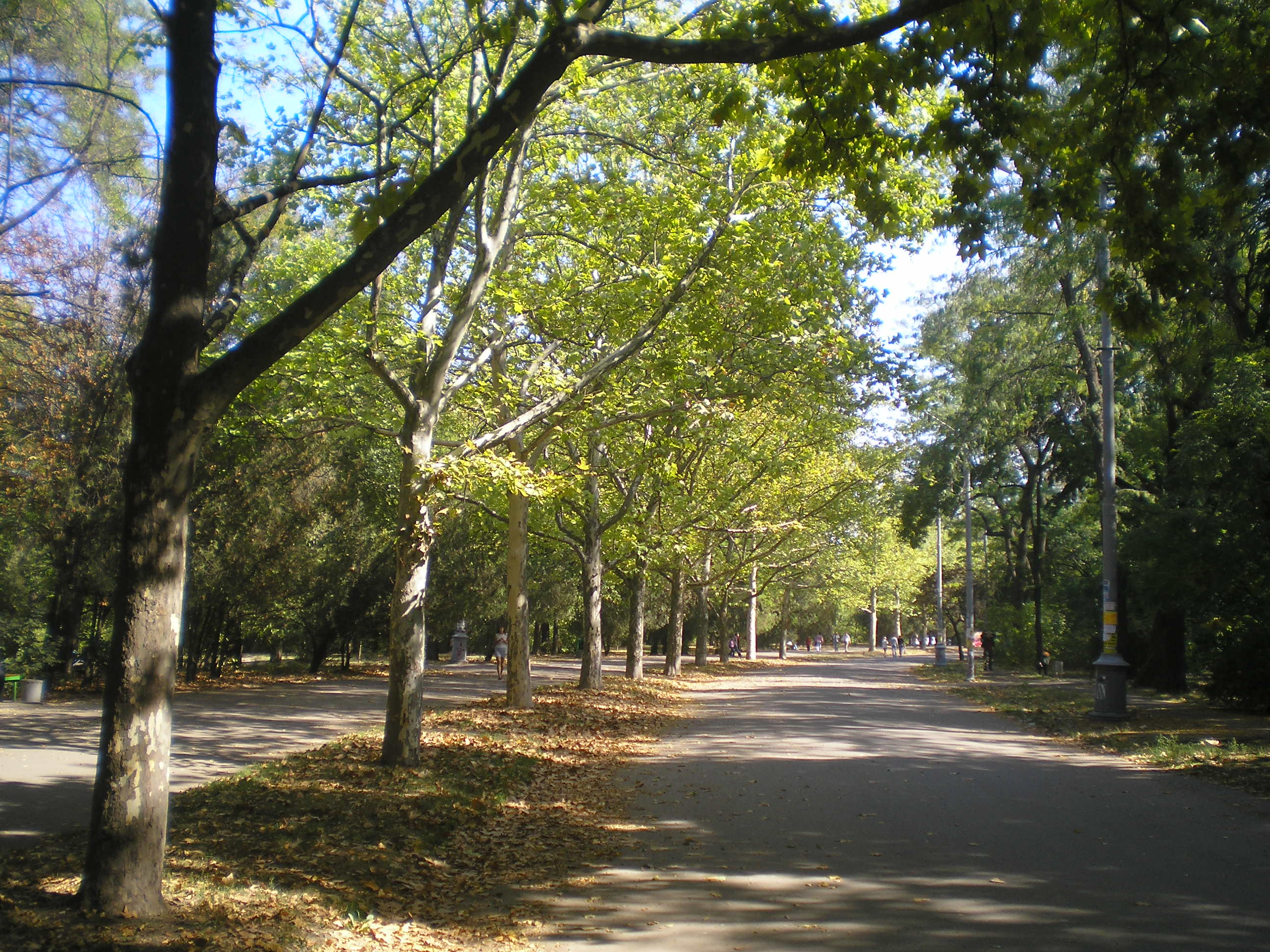 Парк Шевченко, Одеса